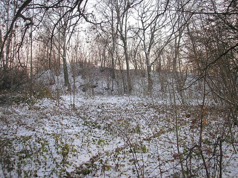 Burgstall Fuchsberg (Kissing, Landkreis Aichach-Friedberg, Bayerisch-Schwaben). Ansicht von Norden. Eigene Aufnahme, Nov. 2007 / Former Fuchsberg castle (Kissing near Augsburg, Bavaria, Germany). View from the north. Own photo, Nev. 2007